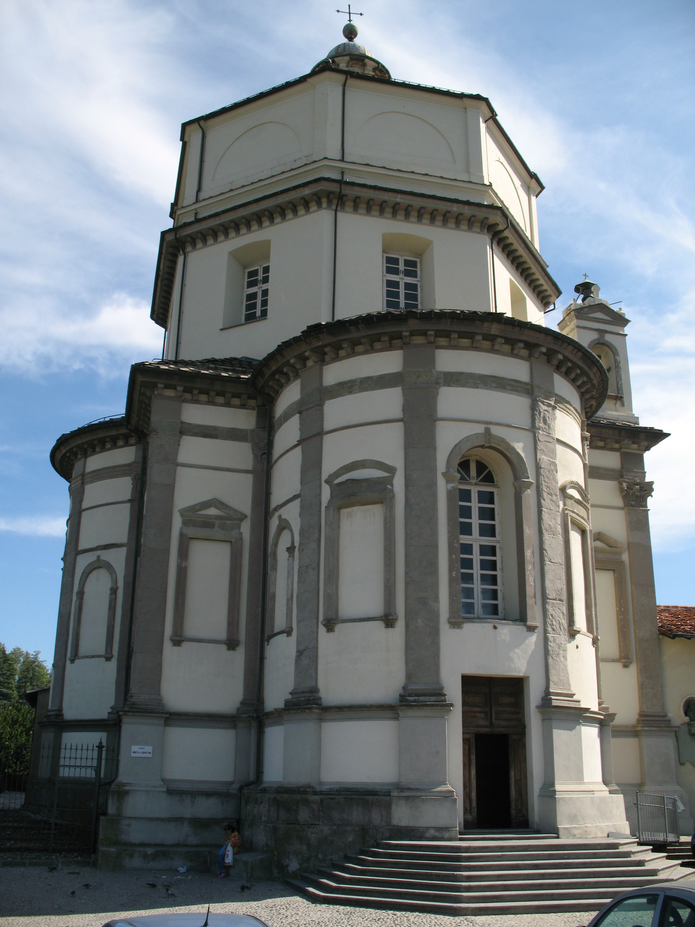 Monte dei Cappuccini, facciata principale della chiesa